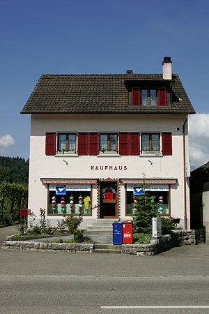 ehemaliges Kaufhaus in Wahlen